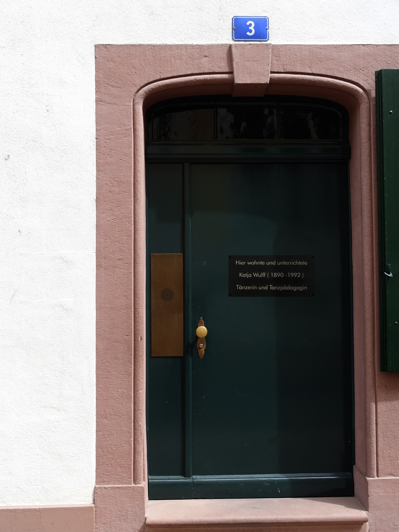 Wohn und Unterrichtshaus von Katja Wulff (1890-1992) Ausdruckstänzerin, Choreografin und Tanzpädagogin an der Augustinergasse 3, Münsterhügel in Basel-Stadt.